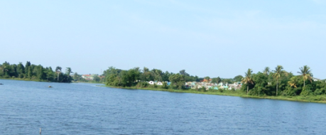 Situ Cibinong